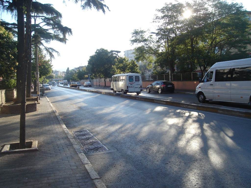 Lisans